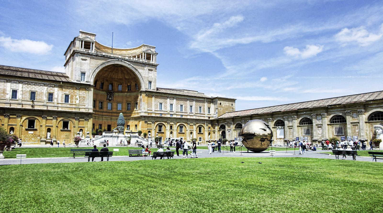 rome